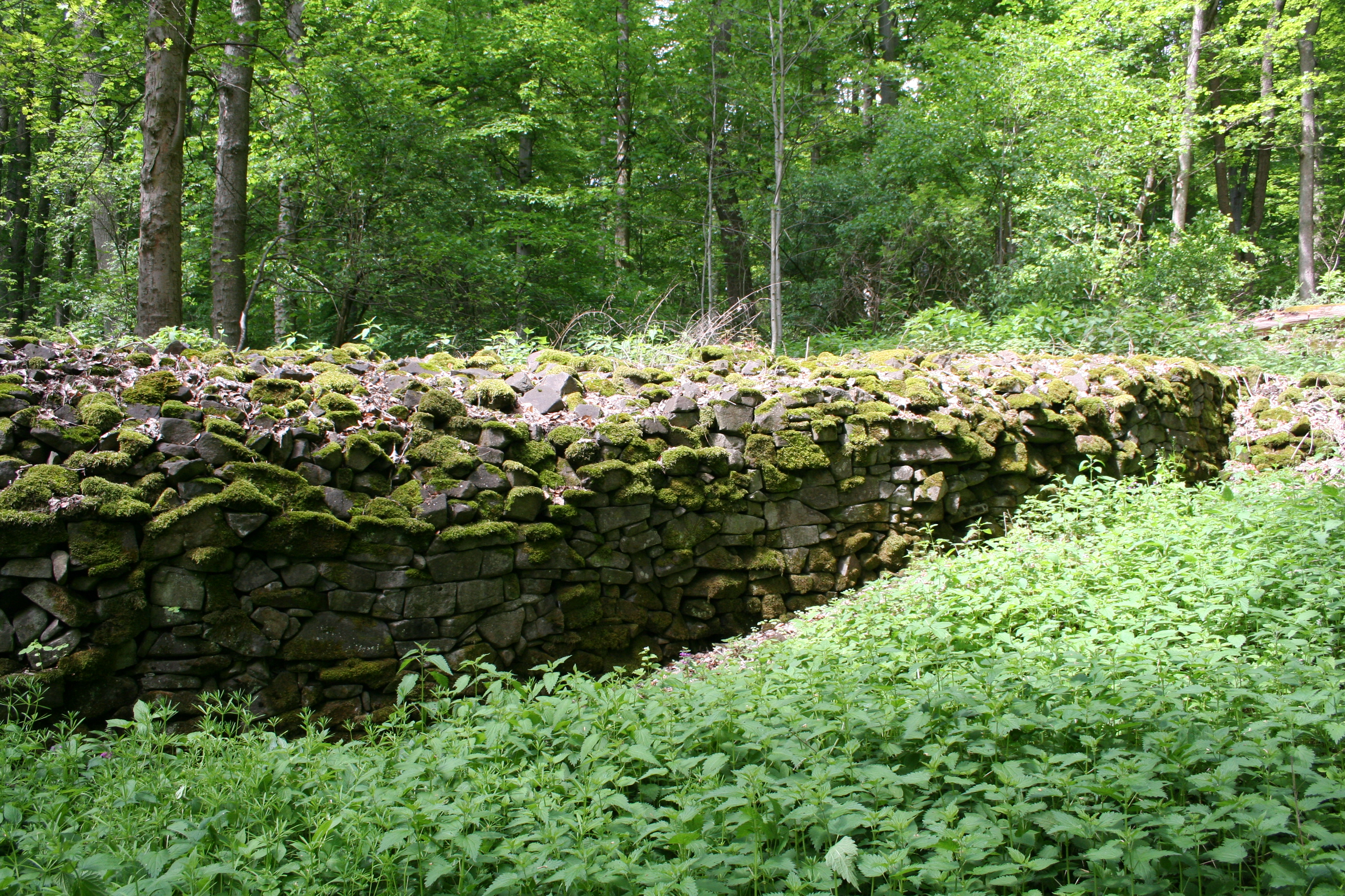 Steinsburg